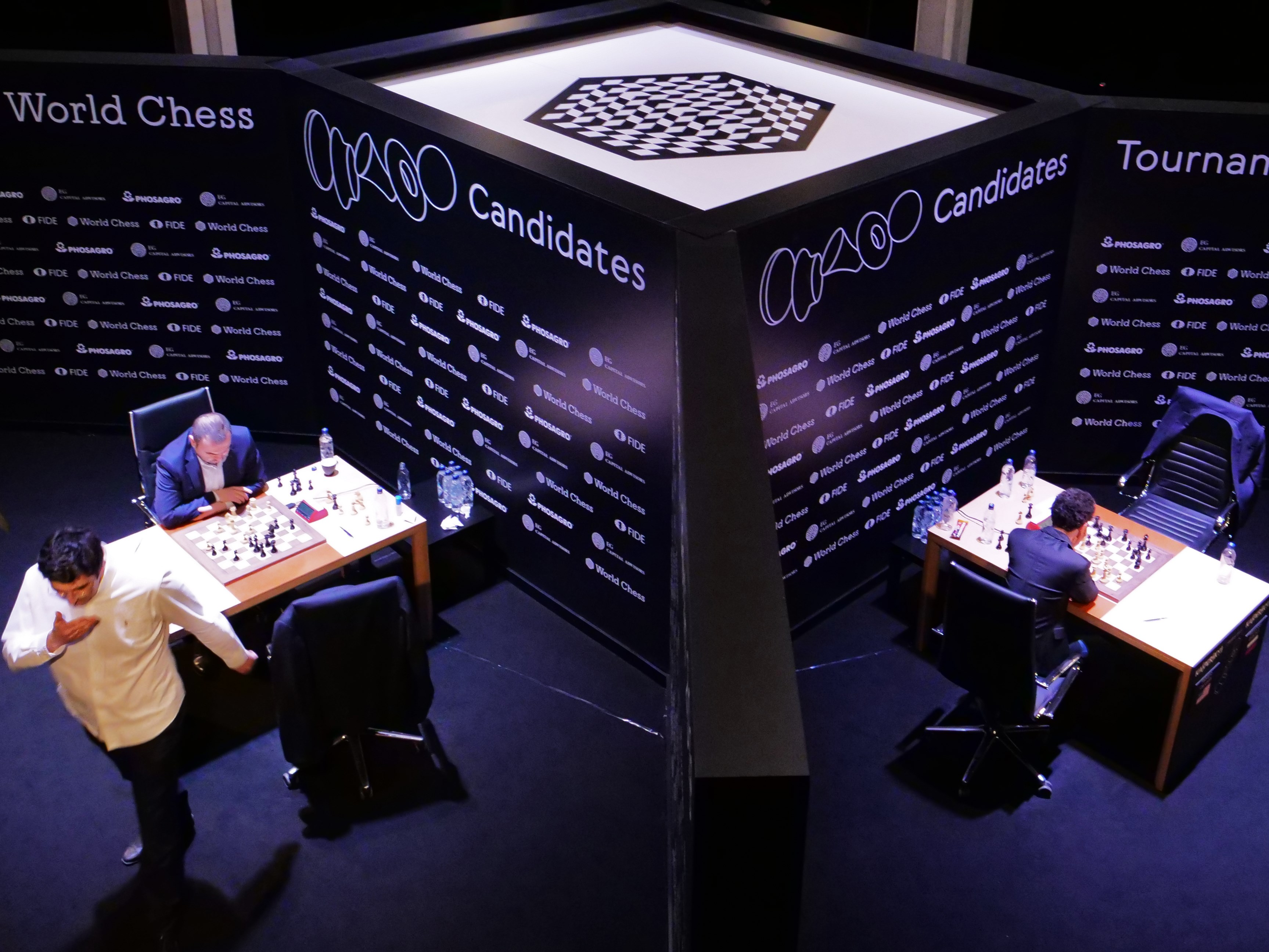 Zuschauerperspektive Kandidatenturnier Berlin 2018, 6. Runde: links Məmmədyarov und Kramnik; rechts Caruana